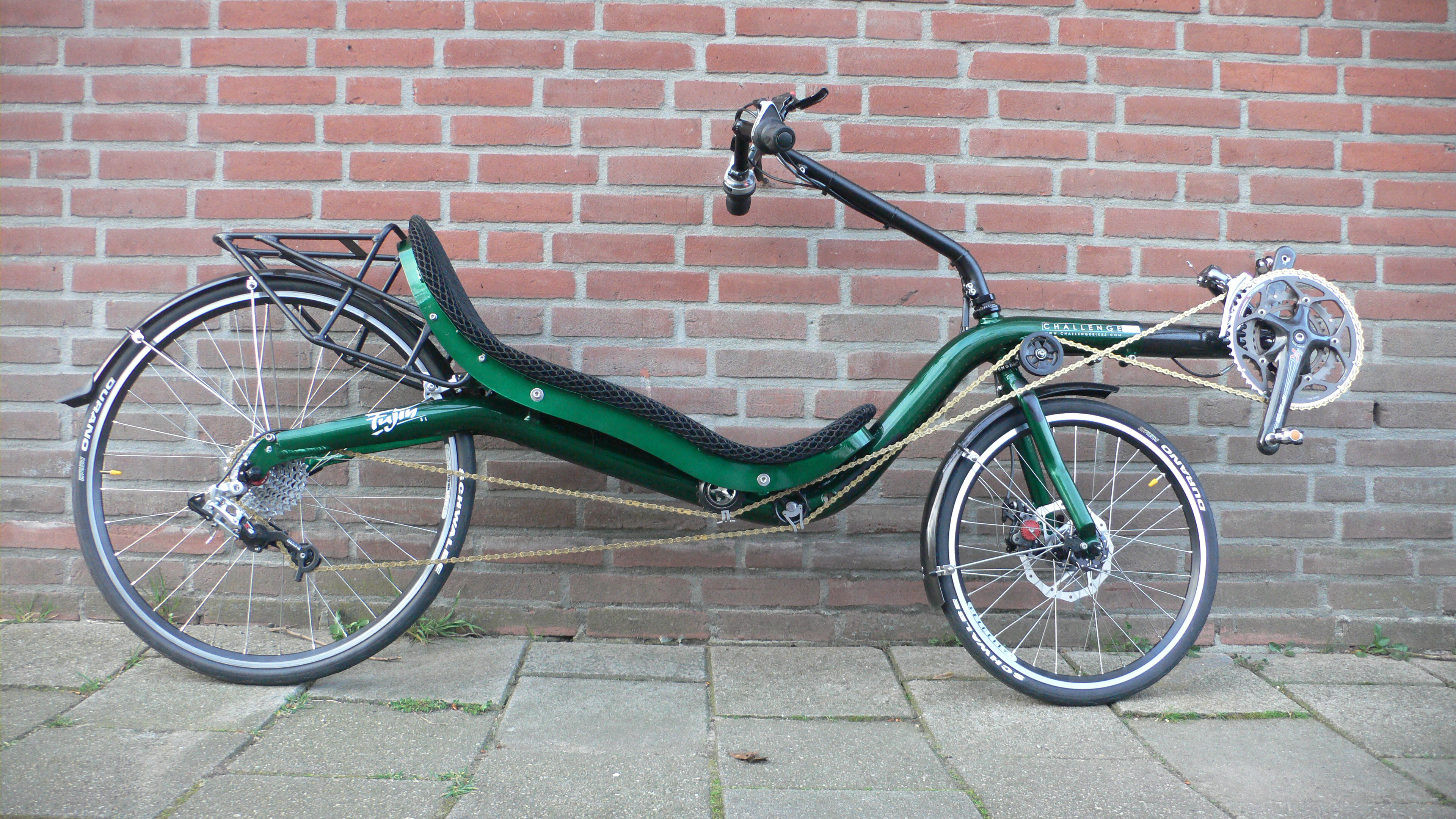 Challenge Fujin SL recumbent, trekking version